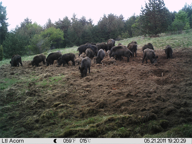 Диви прасета заснети с ловна камера Ltl acorn